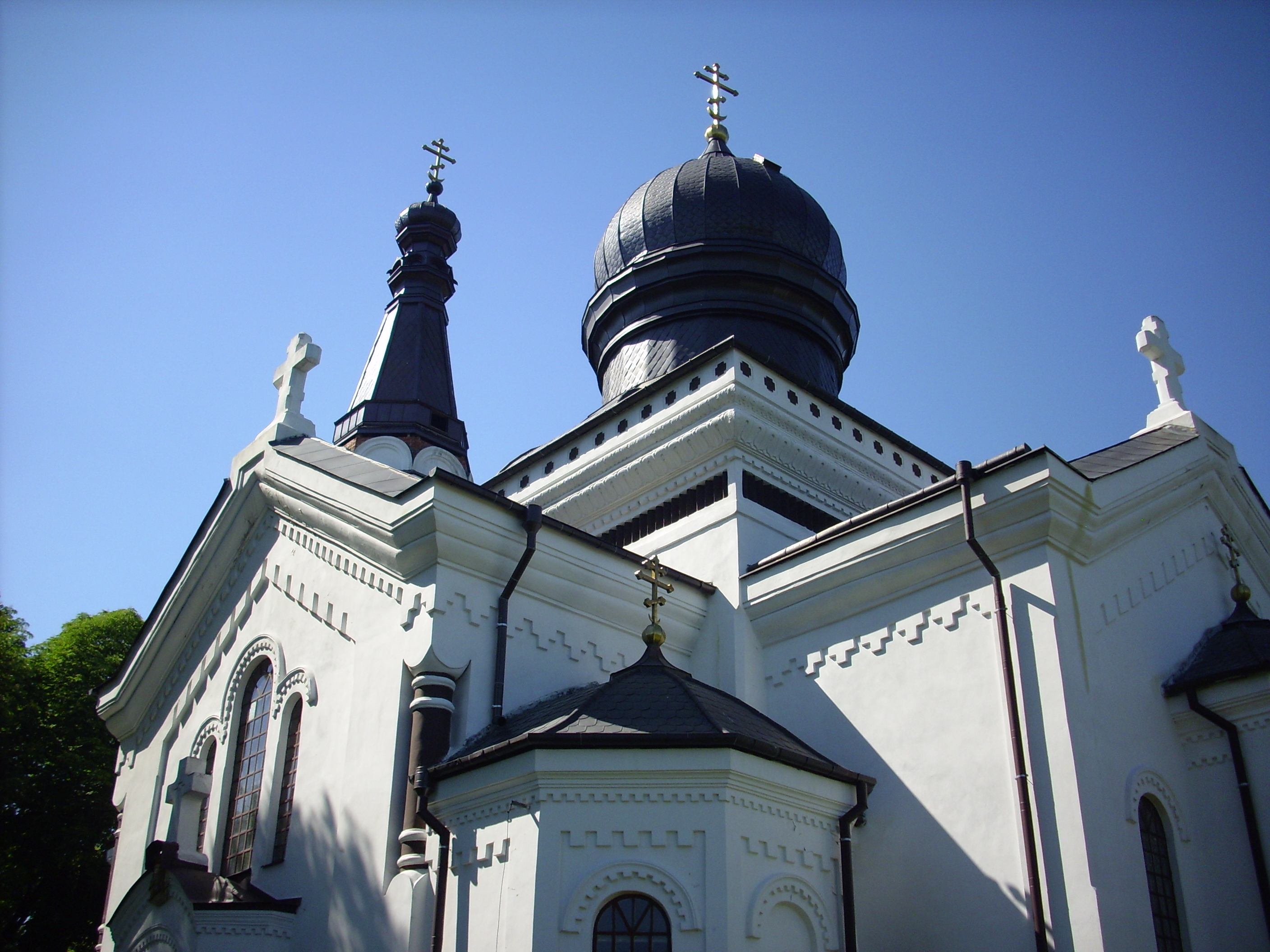 Włodawa (woj. lubelskie, Polska). Cerkiew prawosławna pw. Narodzenia Najświętszej Maryi Panny.